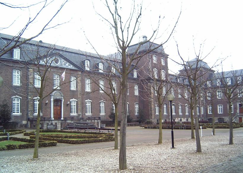 Limburgs: Kloaster Rolduc bie Kirchroa